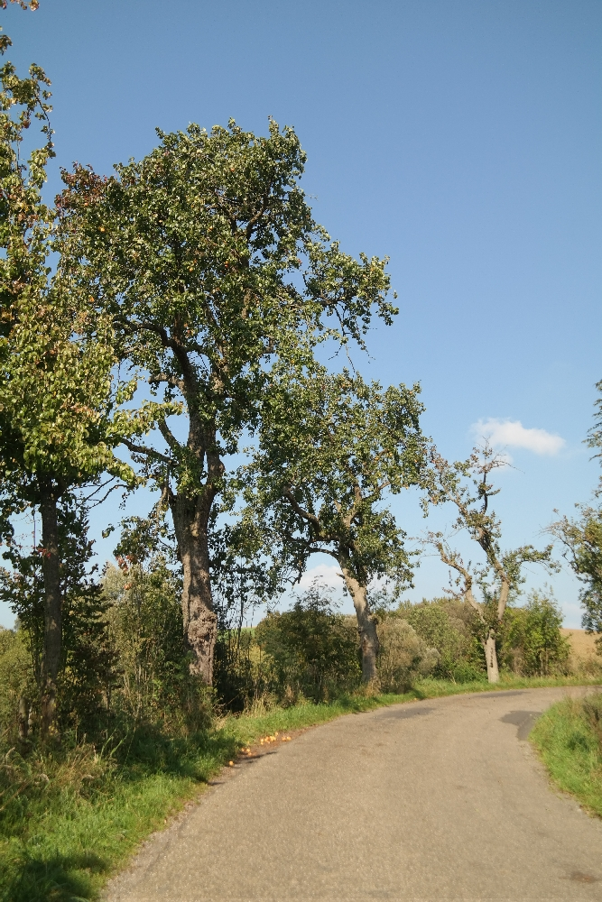 Rheinbirnen an der Birnenallee bei Hennef-Söven